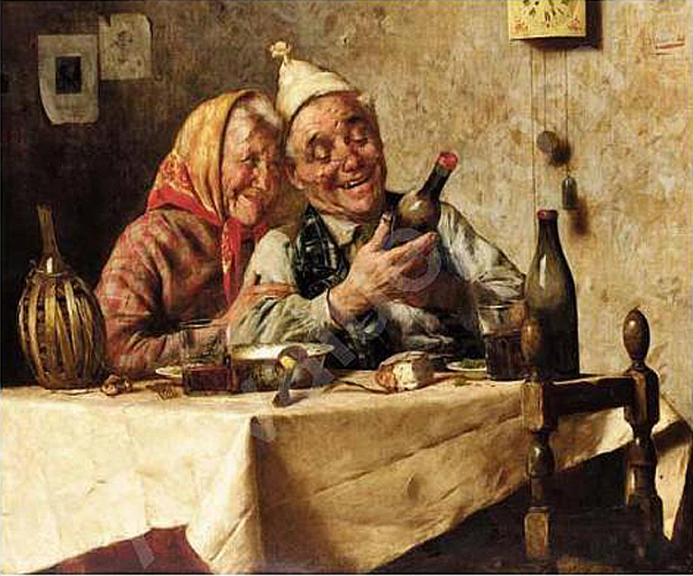 Le marchand de vin et son épousetitle QS:P1476,fr:"Le marchand de vin et son épouse" label QS:Lfr,"Le marchand de vin et son épouse"